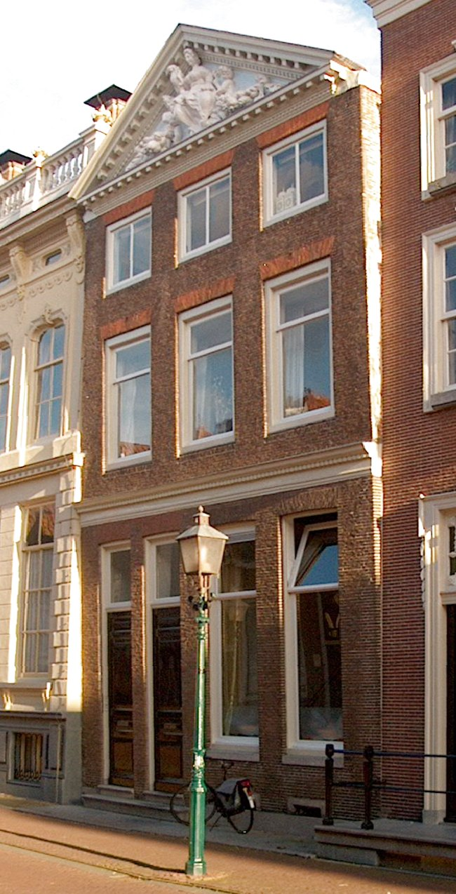 Hoorn, Grote Oost 24 (IM013778)